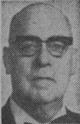 Arkitekten Allan Nilsson